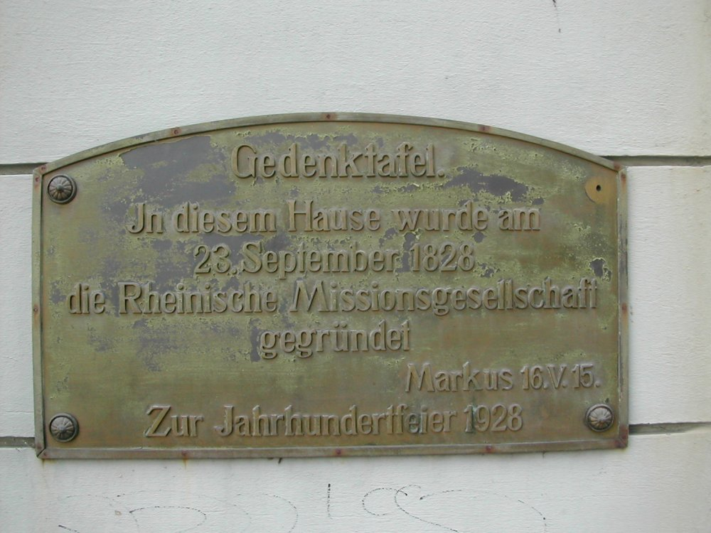 Gedenktafel zur Gründung der Rheinischen Mission am Haus Düsseldorfer Straße 9 in Mettmann.